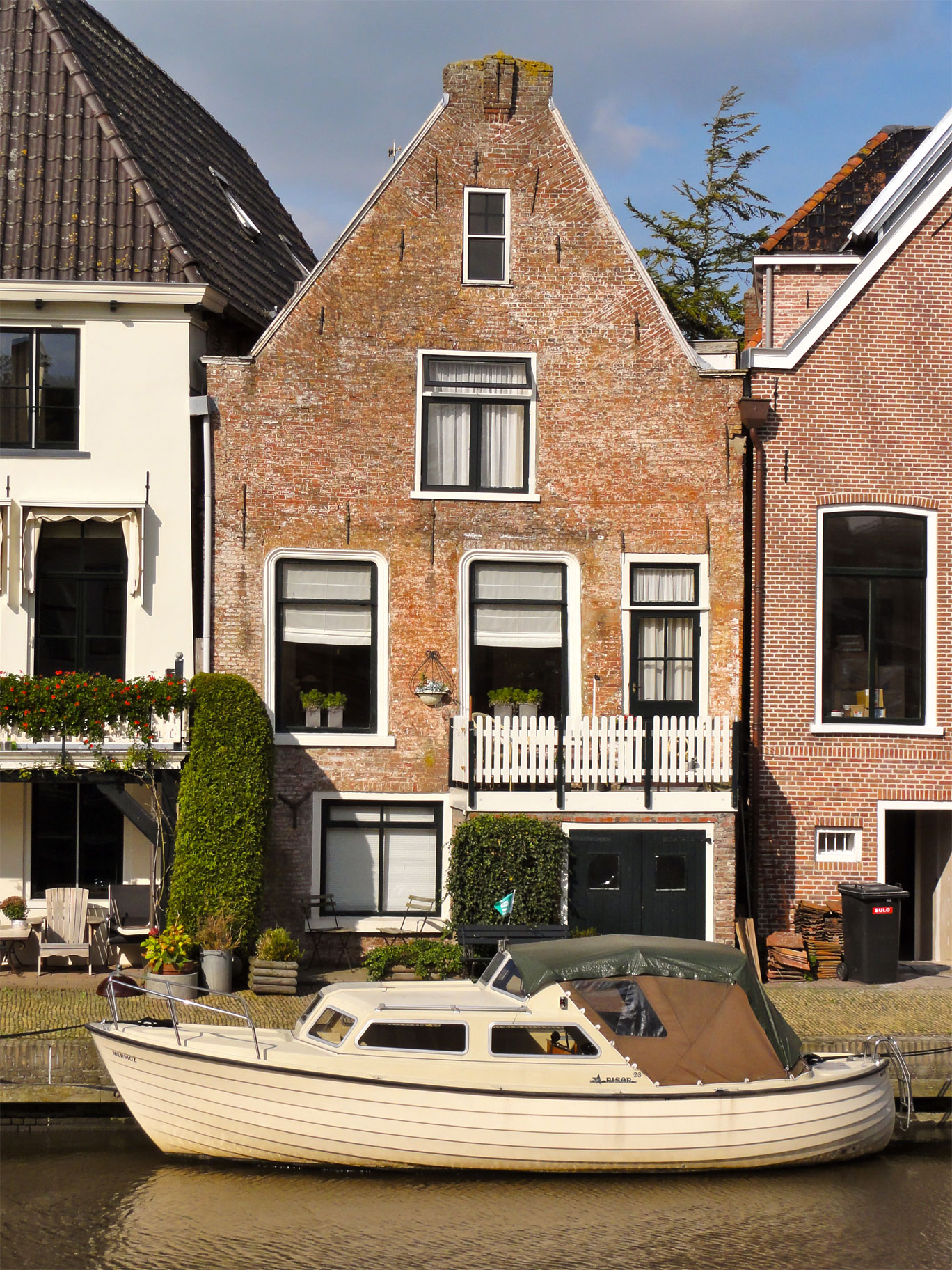 Achtergevel Nauwstraat 13 Dokkum, rijksmonument